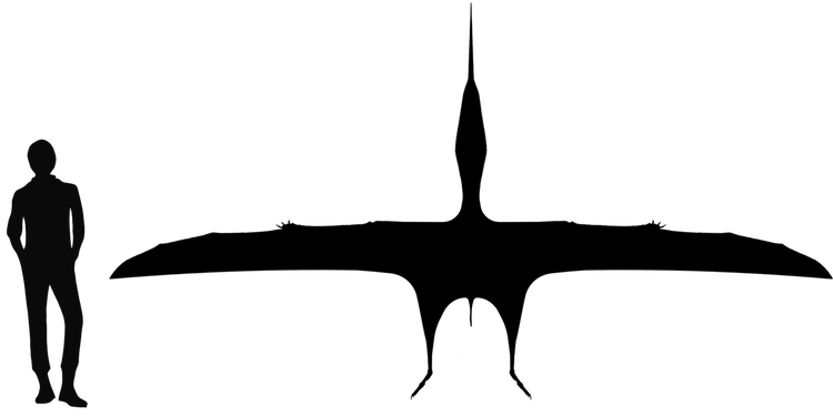 size comparison between Thalassodromeus and an average human